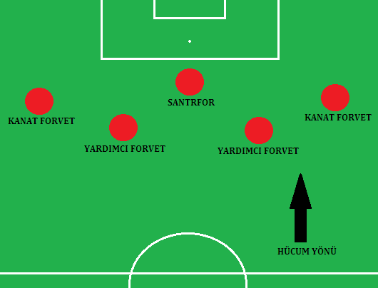 Forvet çeşitleri ve sahadaki konumları